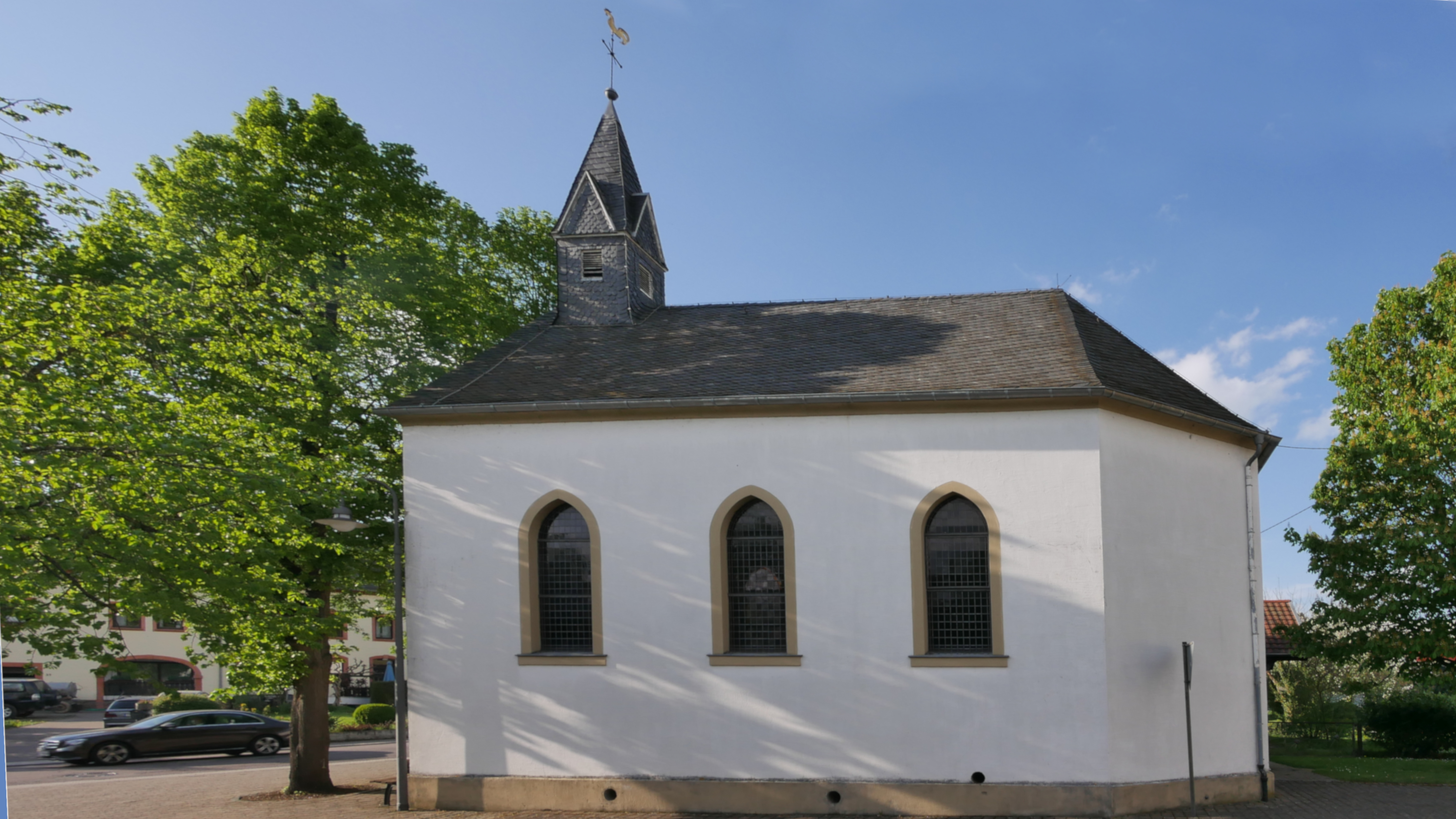 Ayl-Biebelhausen Katholische Filialkirche St. Josef